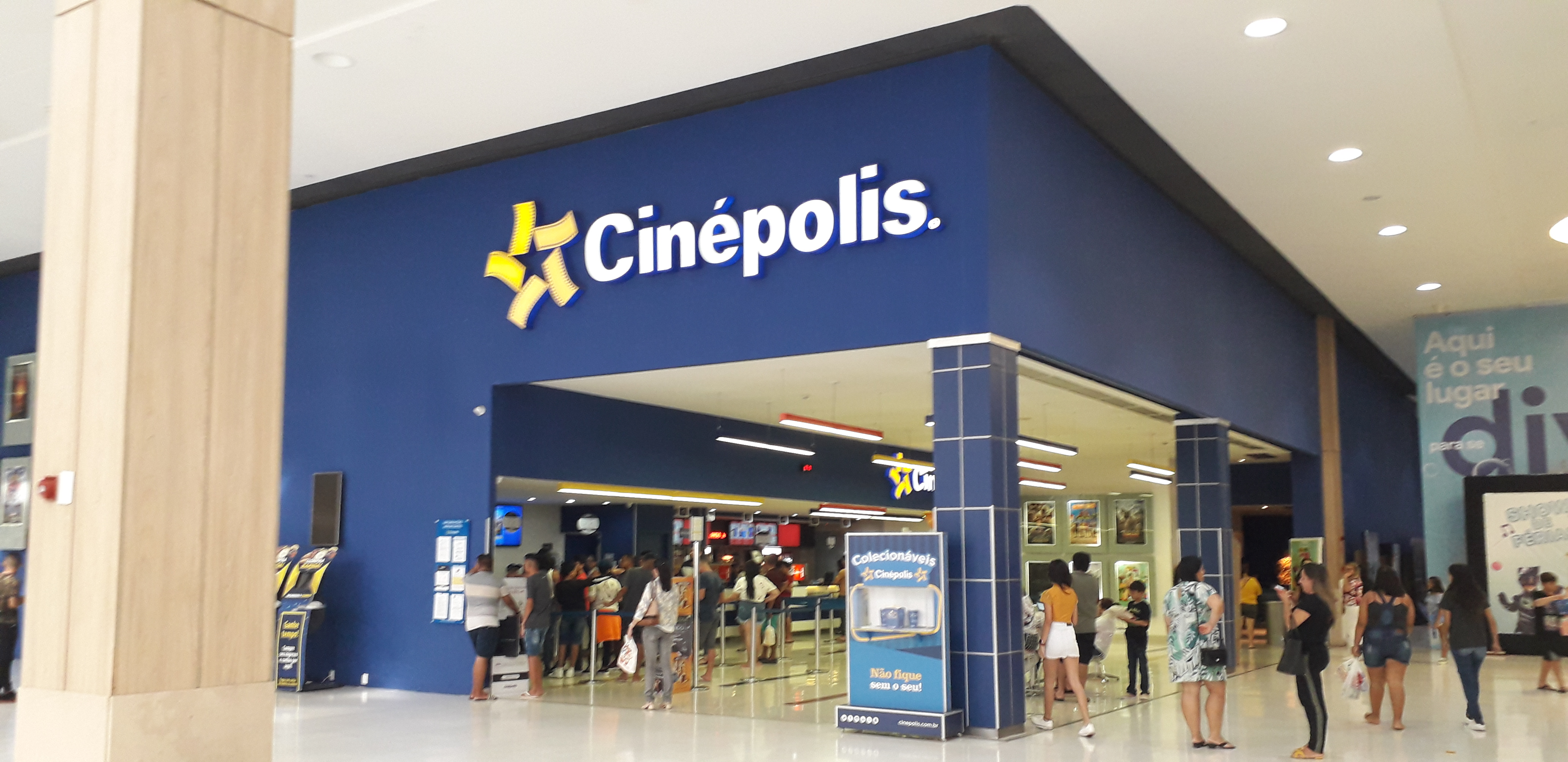 Imagens do complexo de cinemas Cinépolis instalado no Mangabeira Shopping, João Pessoa, PB